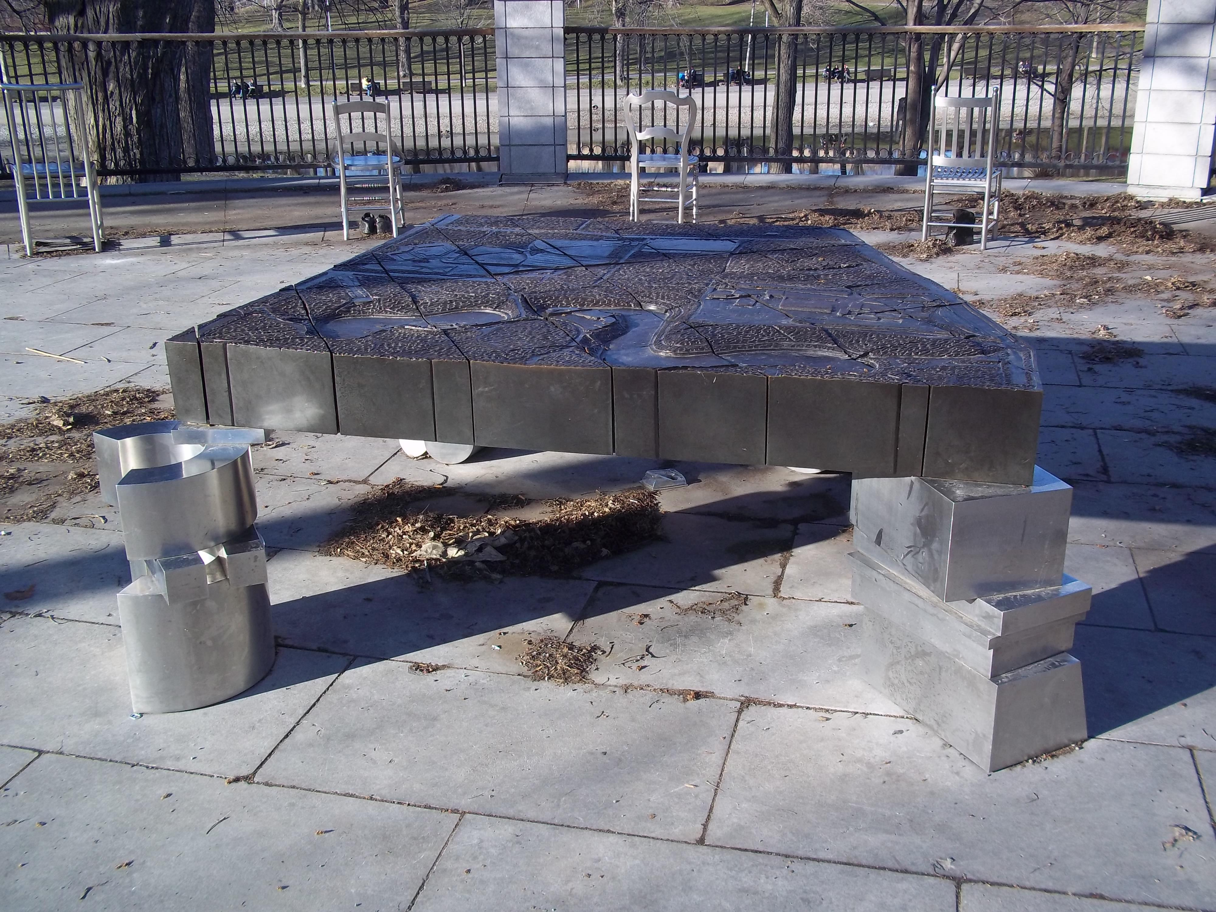 Les Leçons particulières, du sculpteur Michel Goulet, est le nom de deux sculptures-installations situées à Montréal. Le volet 1, de 1990, est à la place Roy. Le volet 2, de 1991, est au parc La Fontaine, au belvédère Léo-Ayotte.